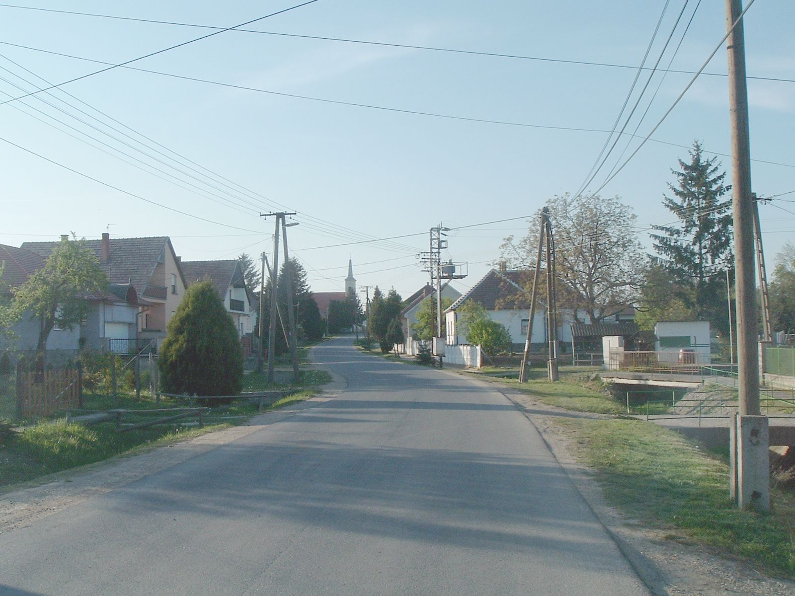 Nárai, Hungary